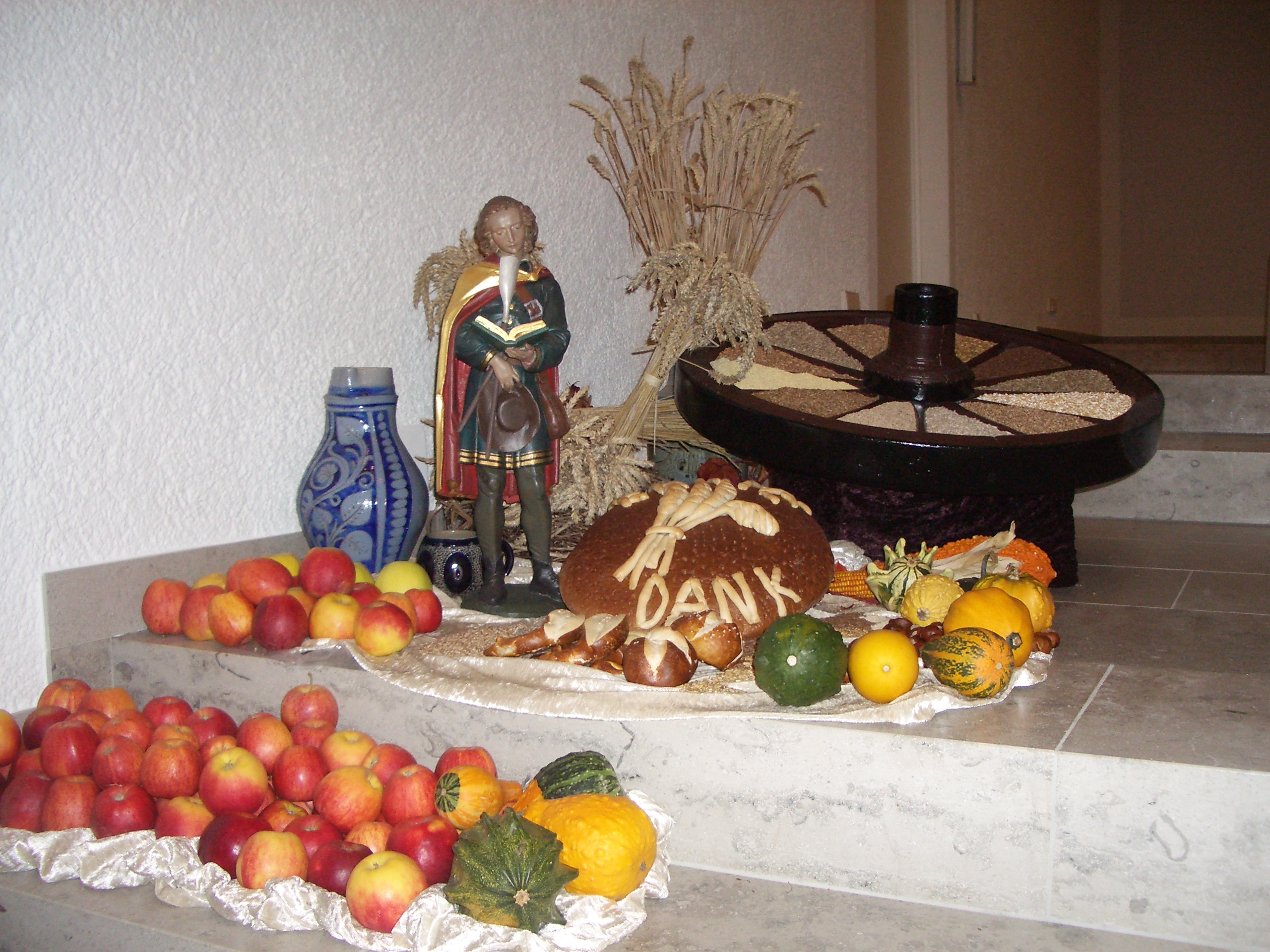 Erntedankgaben in der Kath. Pfarrkirche St. Johannes Baptist, Ailingen, Stadt Friedrichshafen